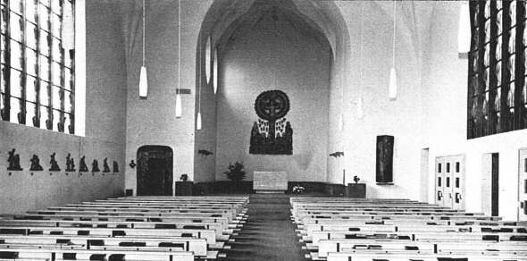 Herz Jesu Kirche in Handrup (Niedersachsen) nach der ersten Renovierung